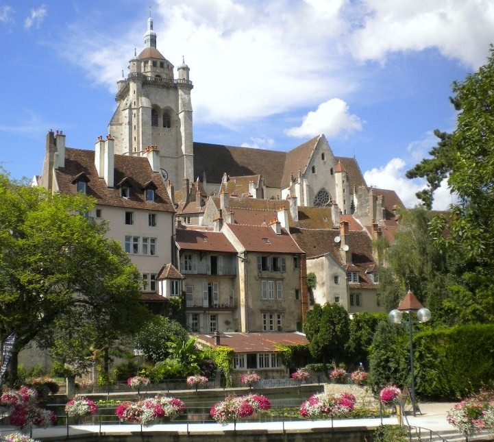 Photographie du quartier des tanneurs et de la collégiale Notre-Dame de Dole, prise en 2012, depuis la Rue du Prélot.